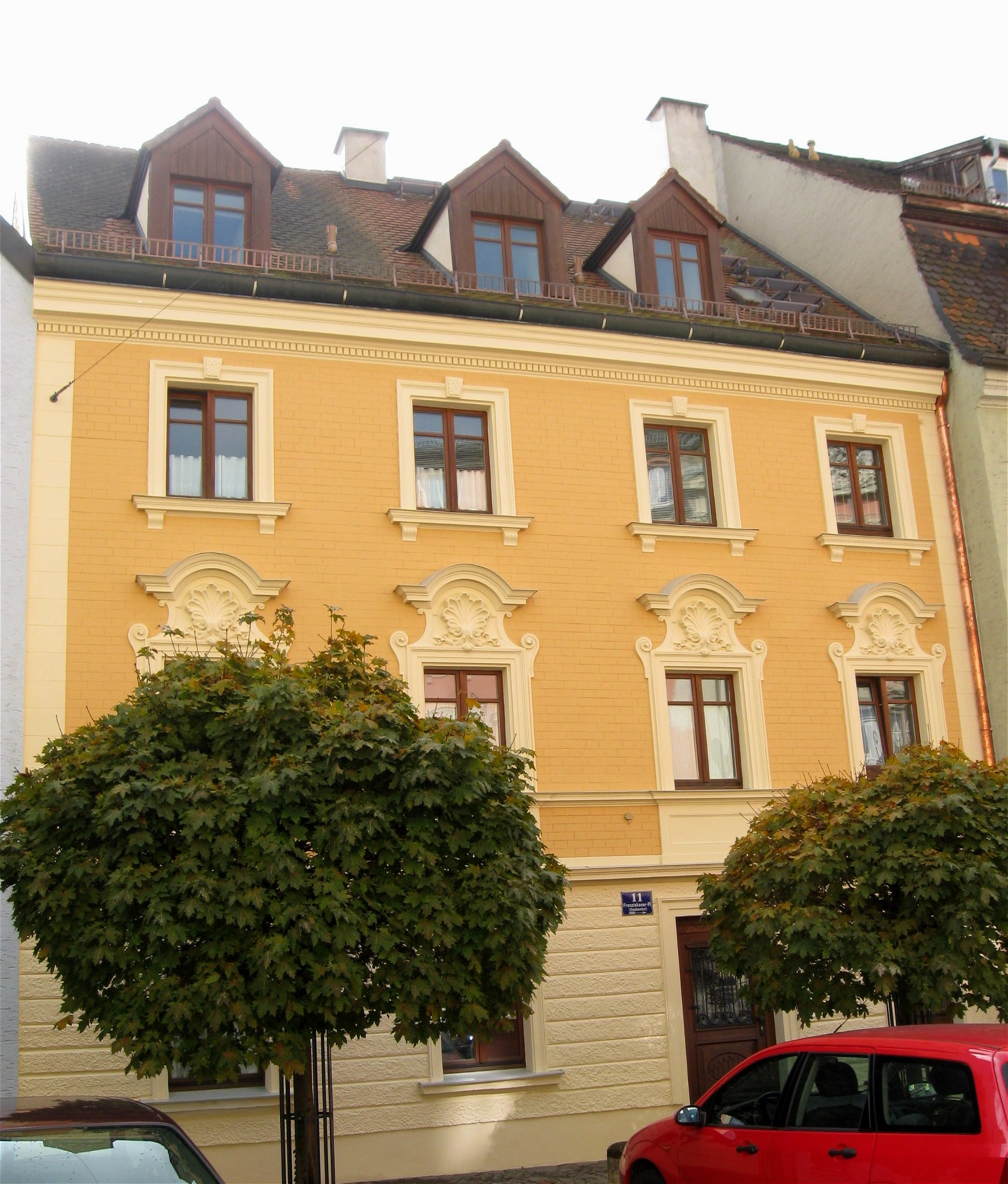 Franziskanerplatz 11; Wohnhaus, dreigeschossiger und traufständiger Satteldachbau, nach Stadtbrand von 1809, Fassade mit Sichtziegel und Neurenaissance-Putzgliederung, Ende 19. Jh.